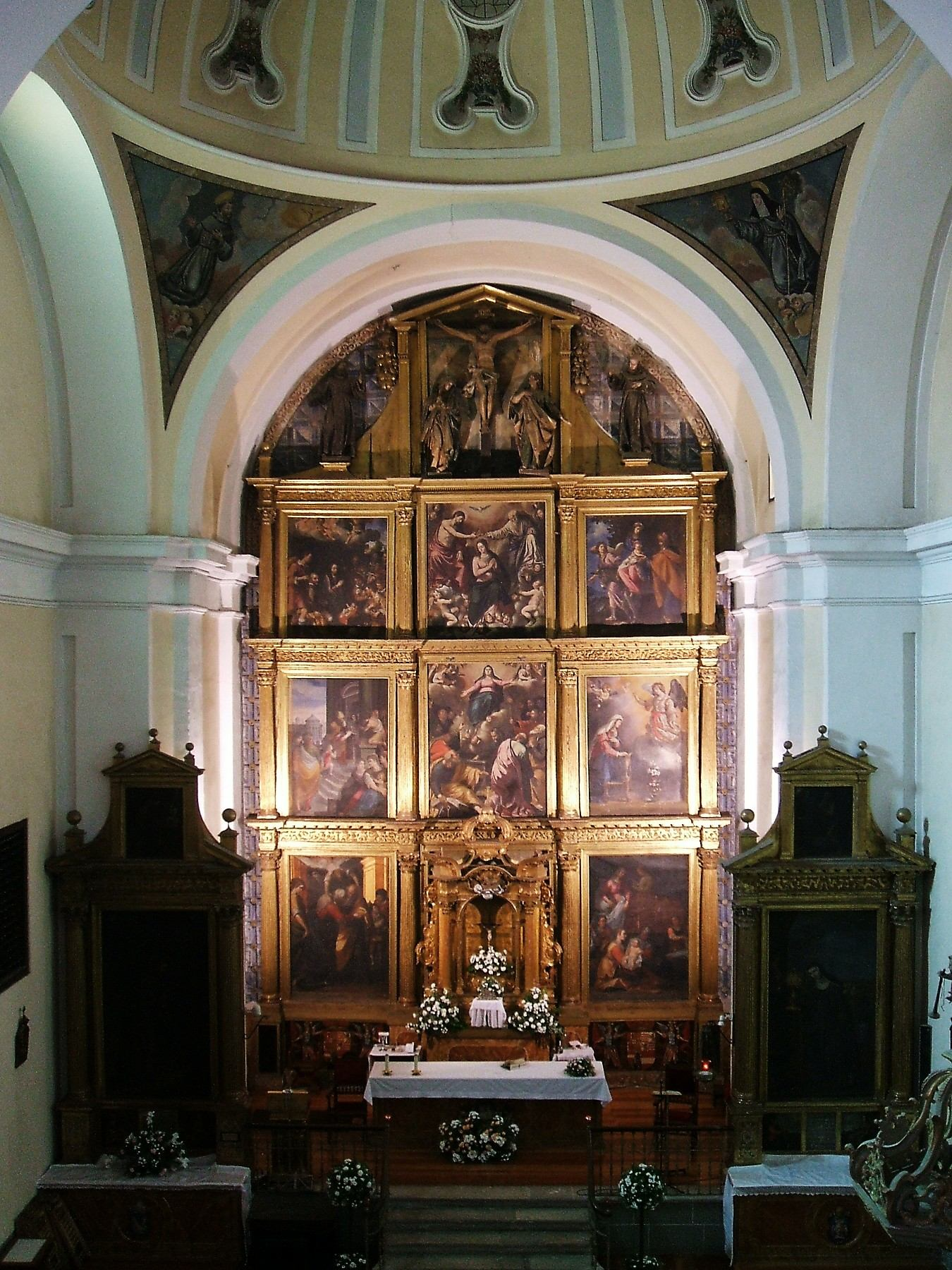 Retablo mayor de la iglesia del Convento de las Descalzas Reales de Valladolid